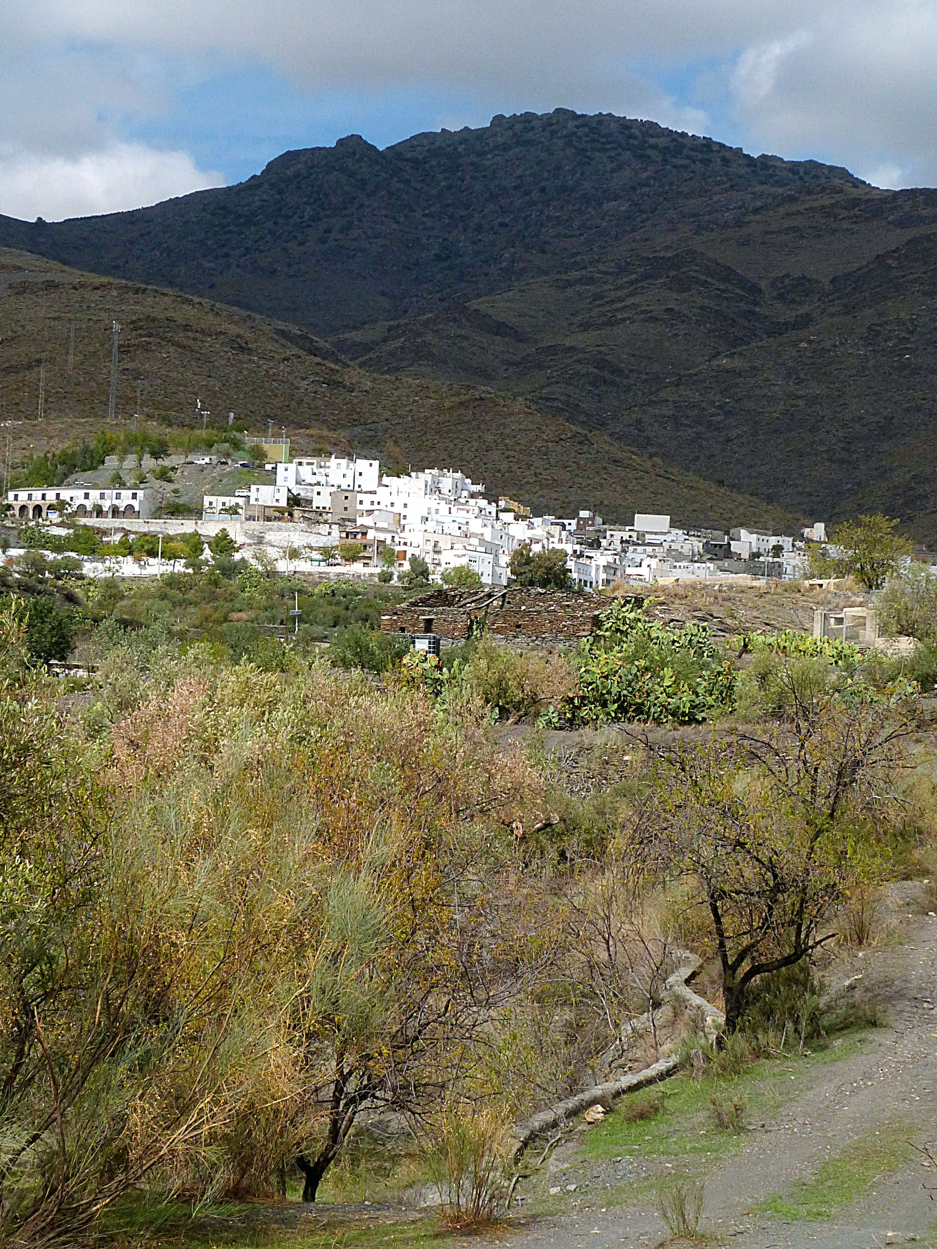 Velefique/Sierra de los Filabres